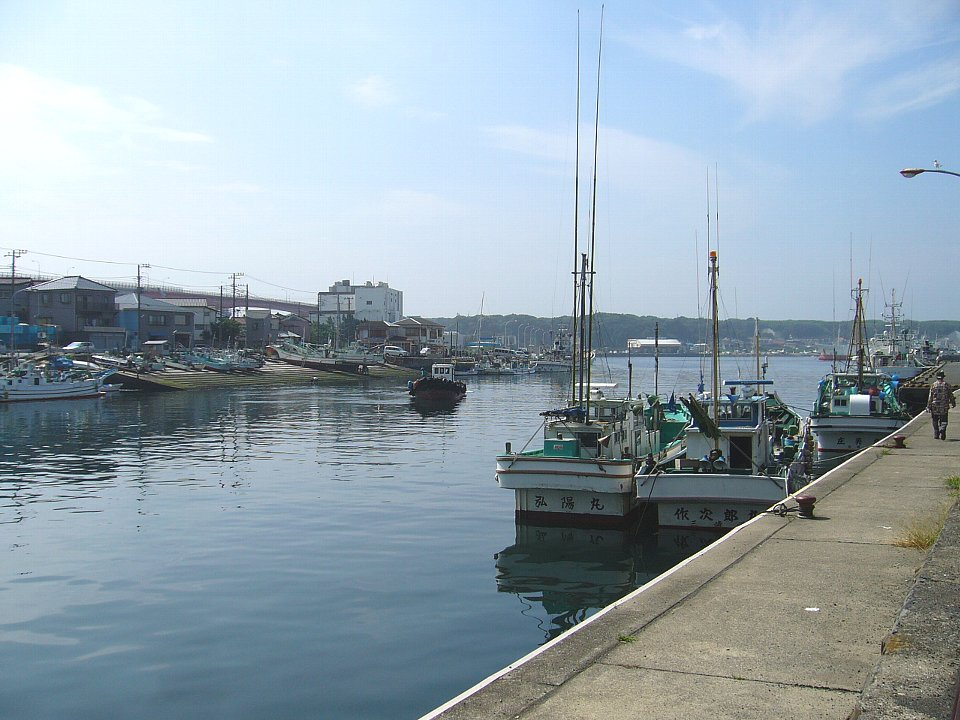 三崎漁港 奥はja:城ヶ島